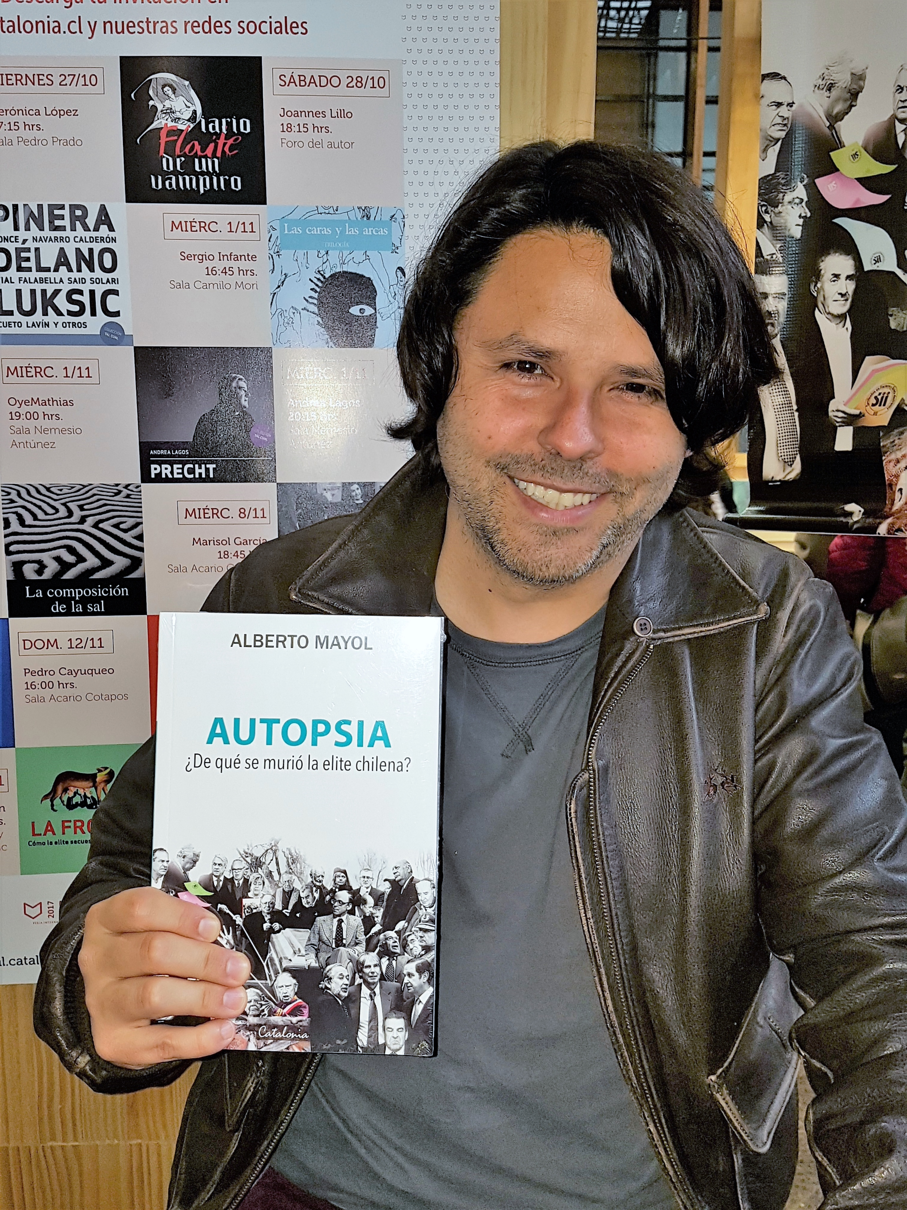 El sociólogo y político chileno Alberto Mayol en la Feria Internacional del Libro de Santiago 2017.